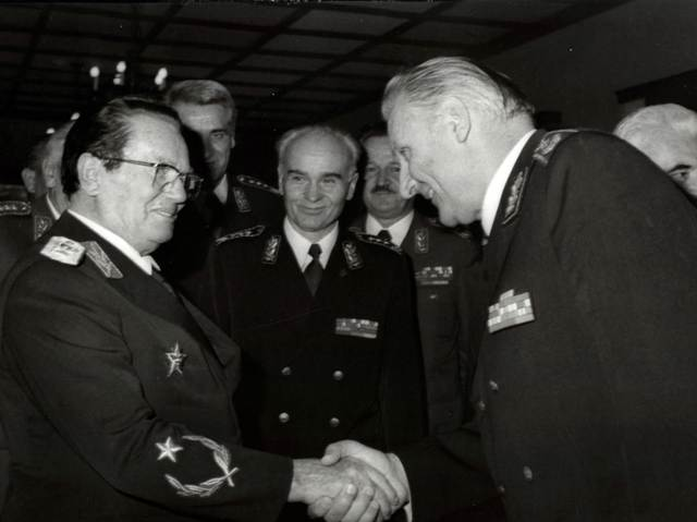 Prijem predstavnika JNA povodom Dana armije kod predsednika Titau "Beloj vili", Brioni, 21.12.1977. Inventarski broj:1977 663 066